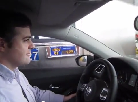 El diputat de Solidaritat Catalana per la Independència Uriel Bertran participant a la campanya #novullpagar contra els peatges a Catalunya.